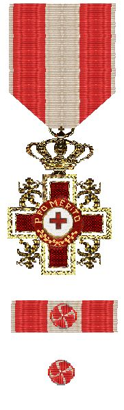 Ereteken_van_Verdienste_Nederlandse_Rode Kruis 1914